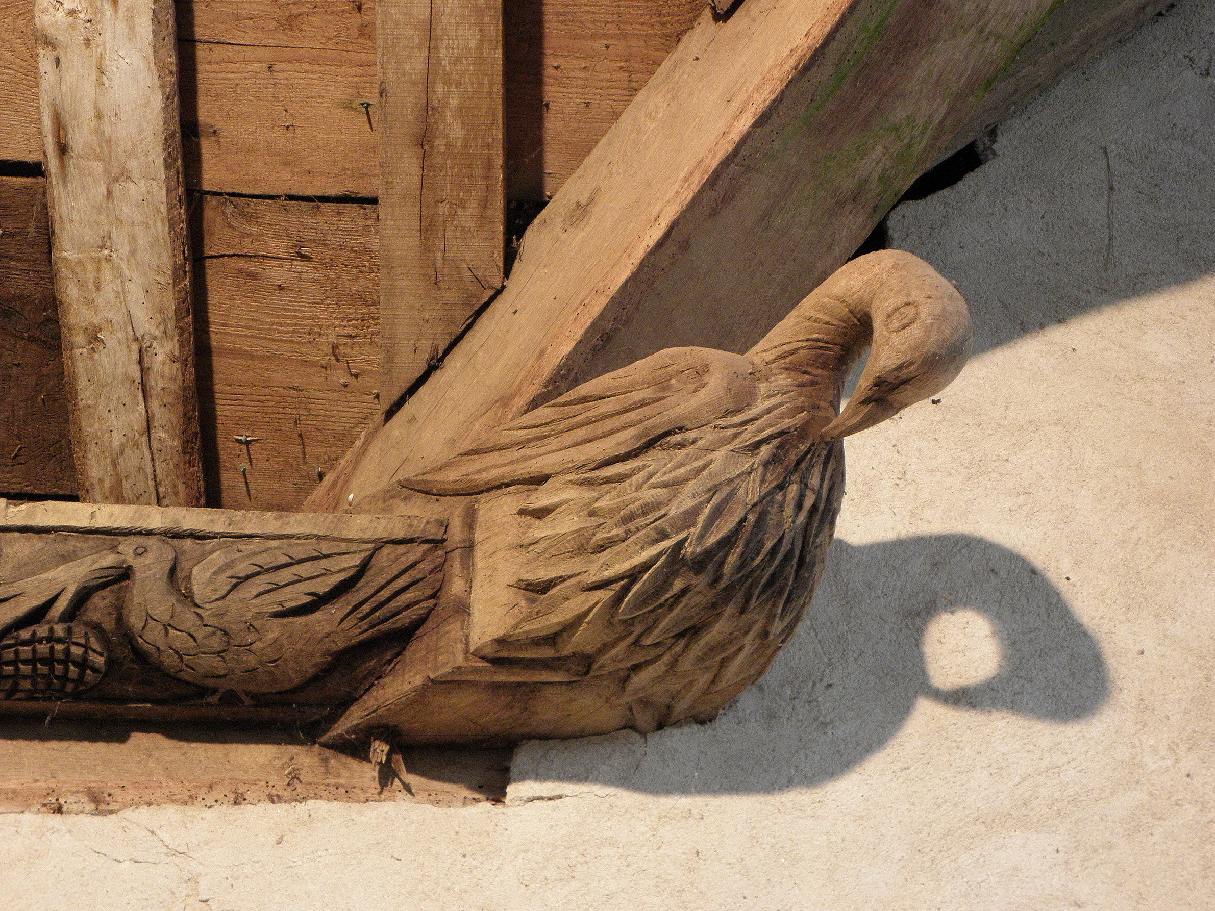 Blochet et sablière du collatéral nord de la chapelle Saint-Côme à Saint-Nic (29).